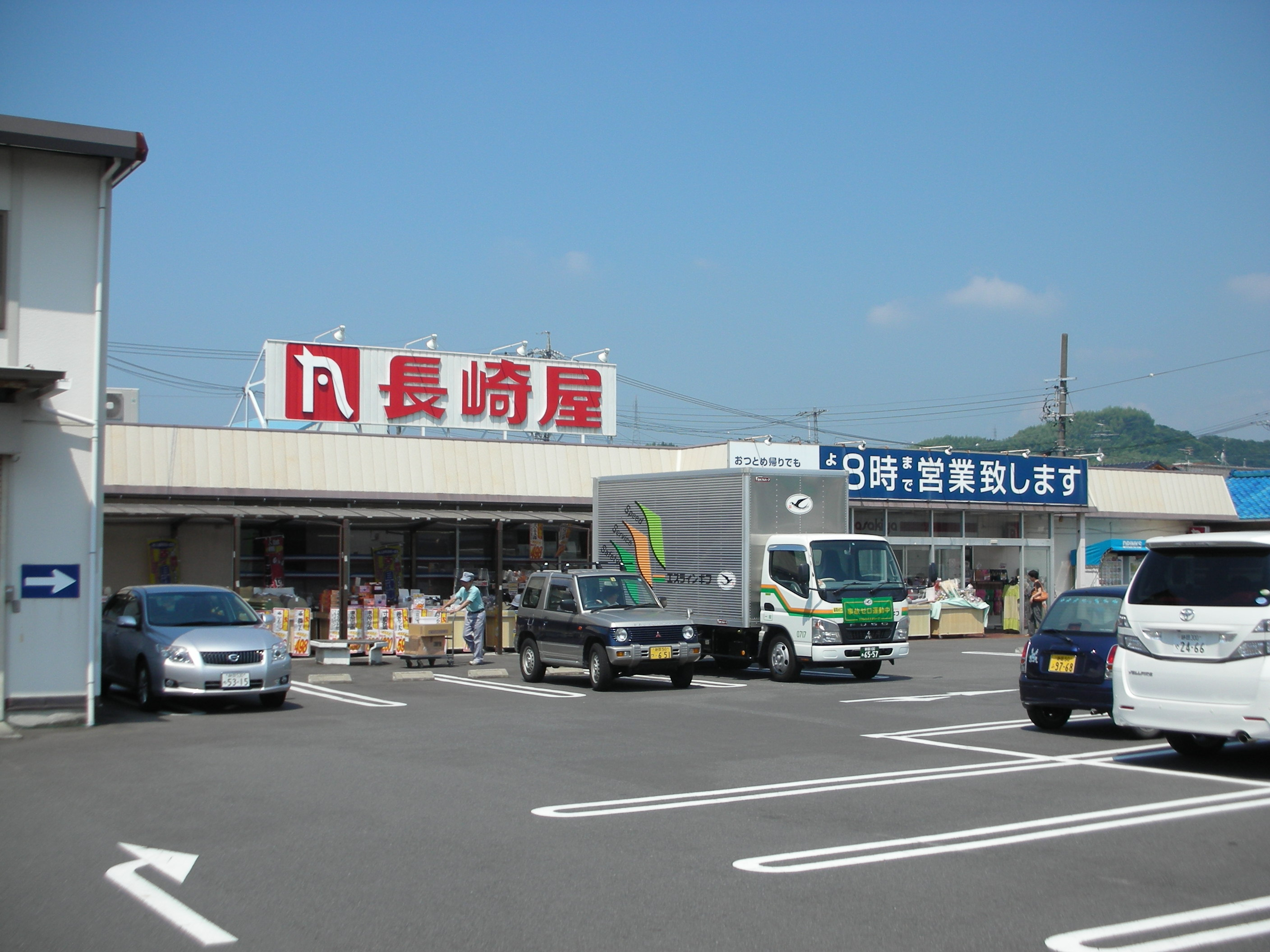 長崎屋瀬名店の外観